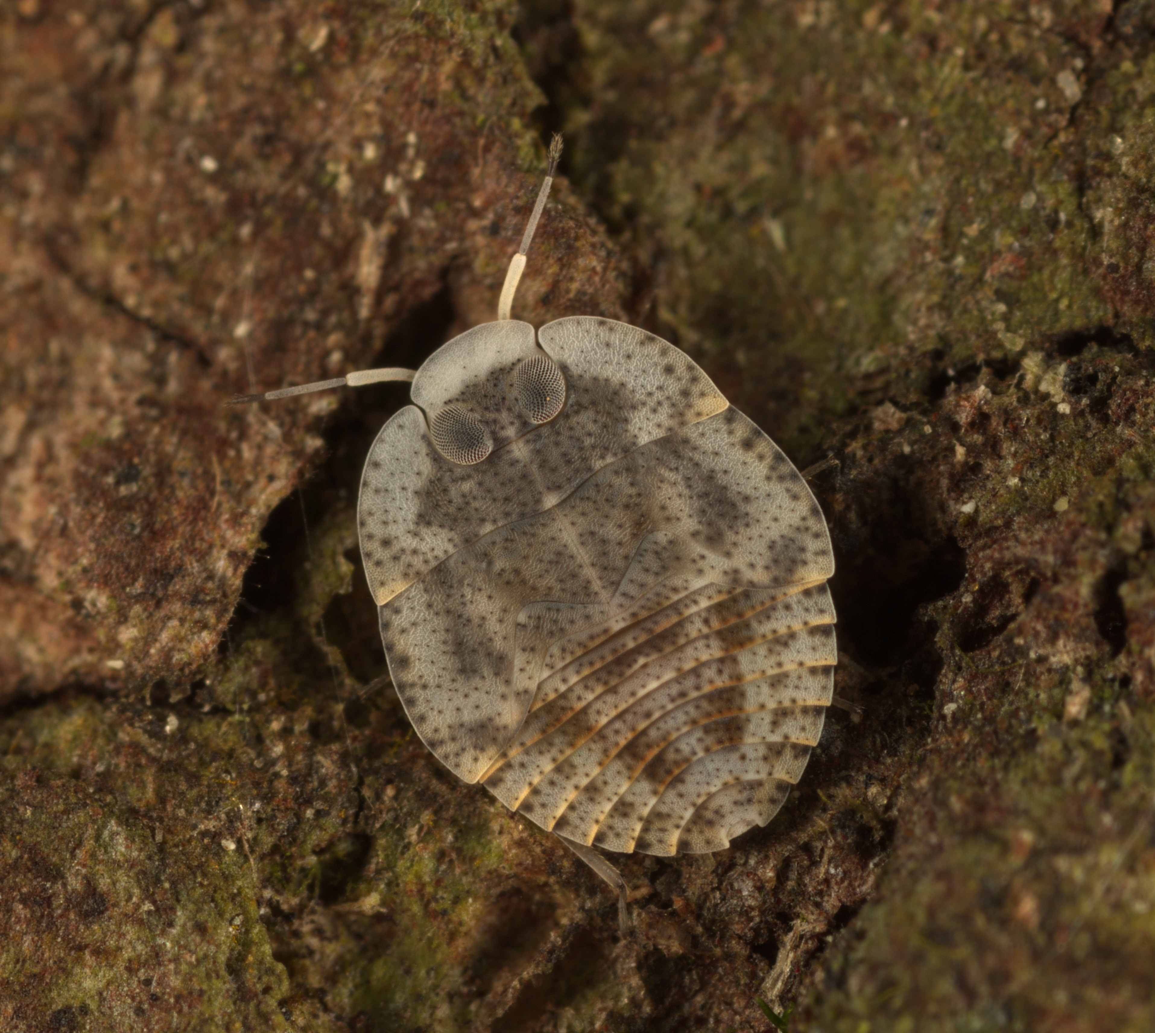 Isometopinae